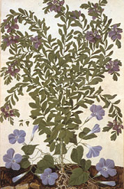 Everhard Kik Polygala and the Blue Convolvulvus aus Badminton florilegium der Mary Somerset, Duchess of Beaufort (1630–1715)